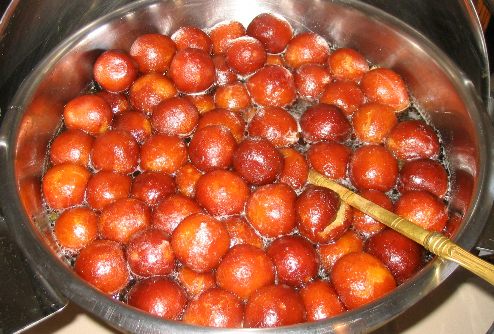 Gulab Jamun, an Indian dish.